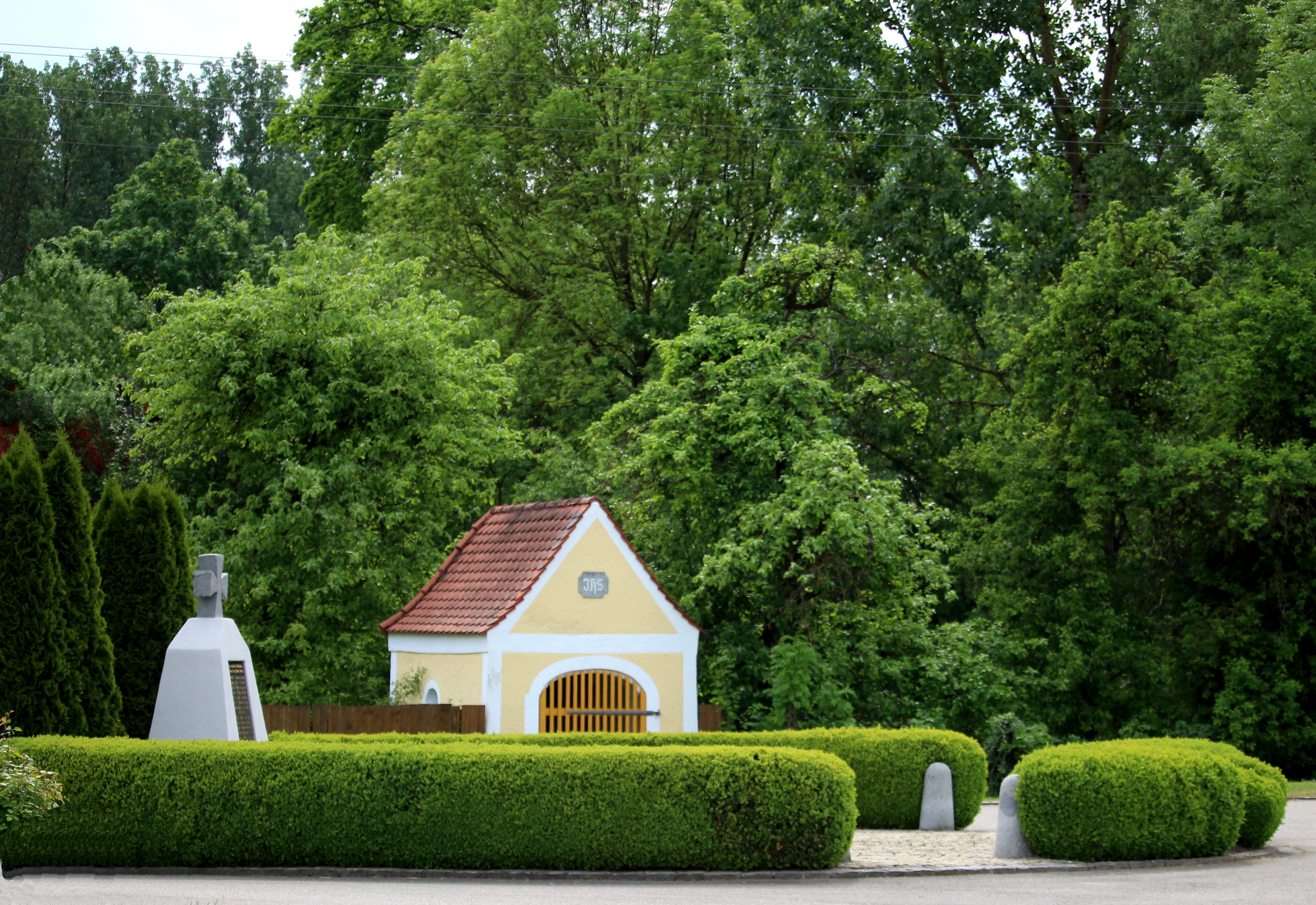 Gaden bei Pförring, Landkreis Eichstätt, Oberbayern: Kapelle